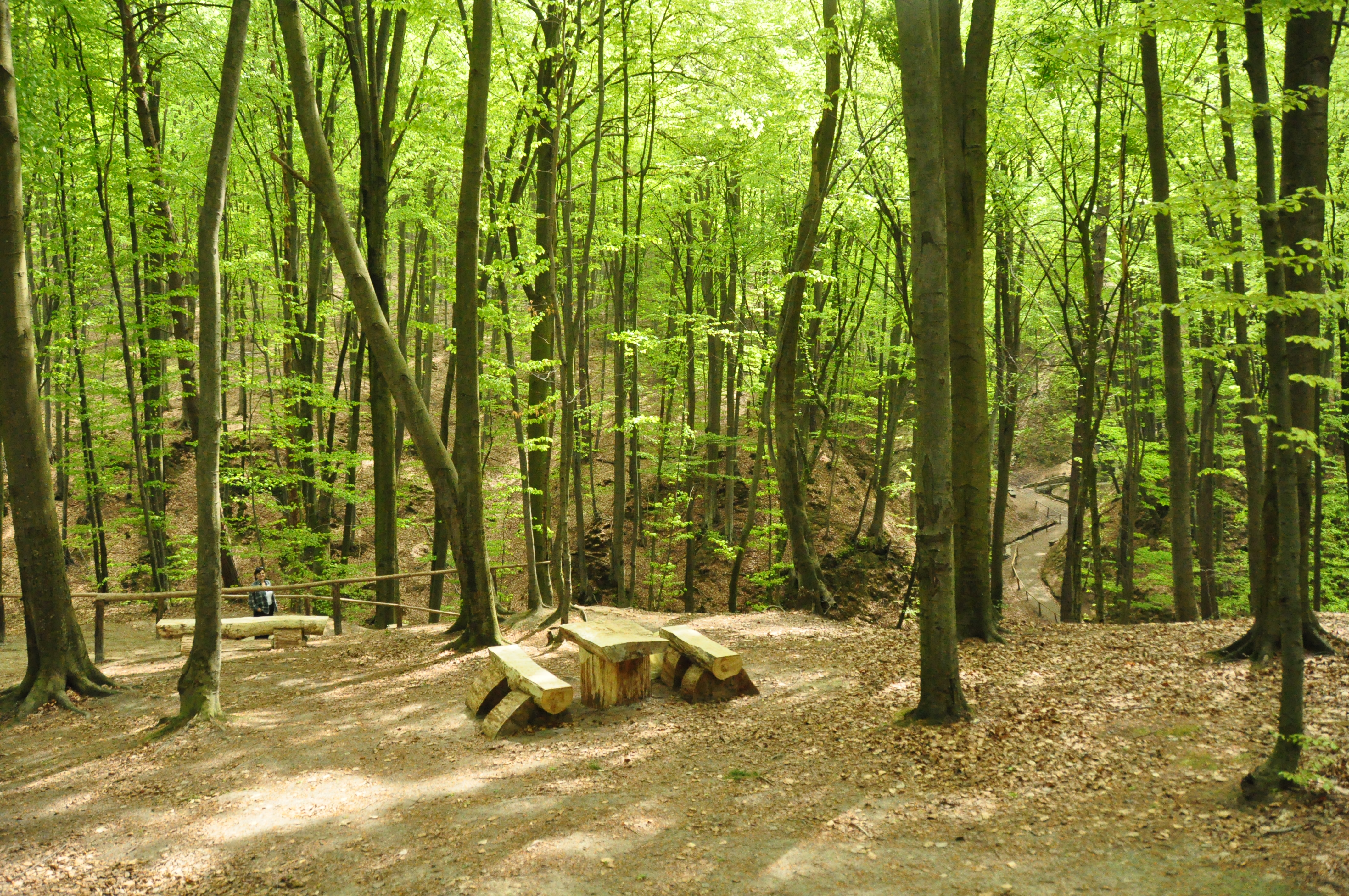 Обладнана стежка до джерела в урочищі Козулька